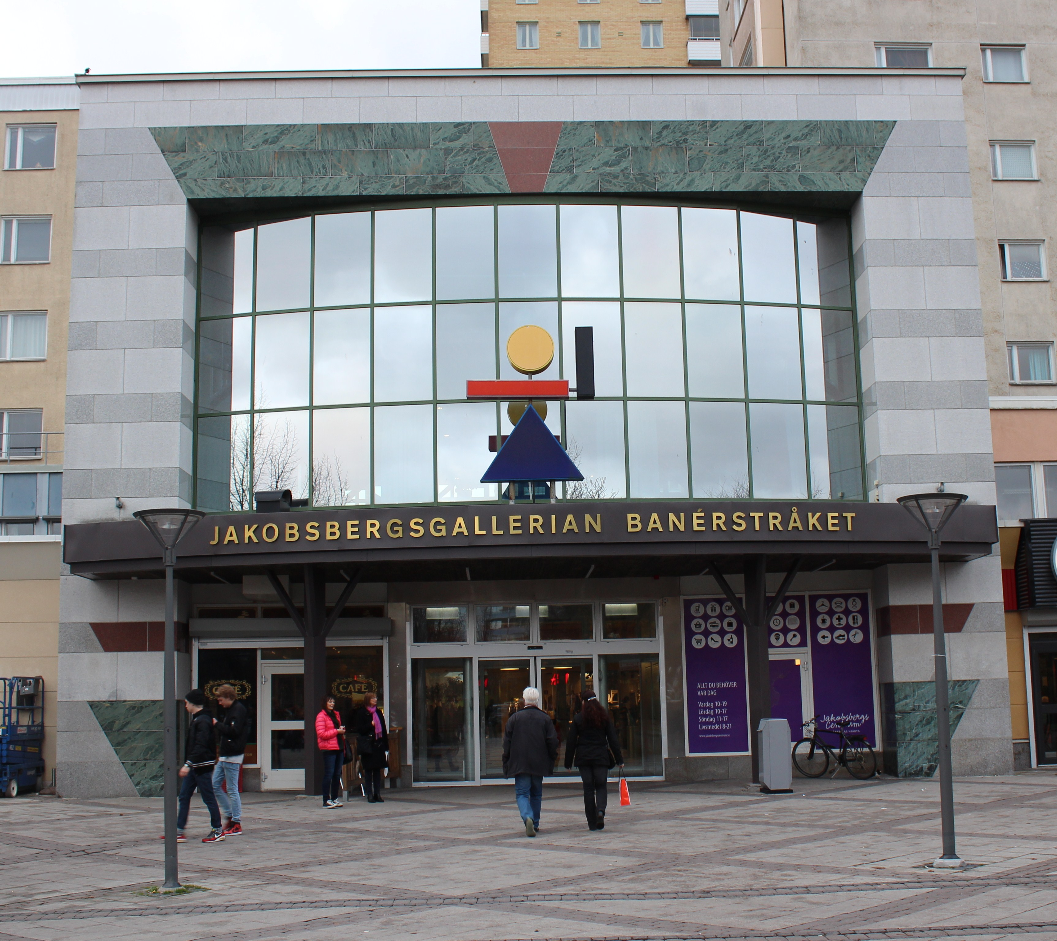 Ingång till Jakobsbergsswe Centrum